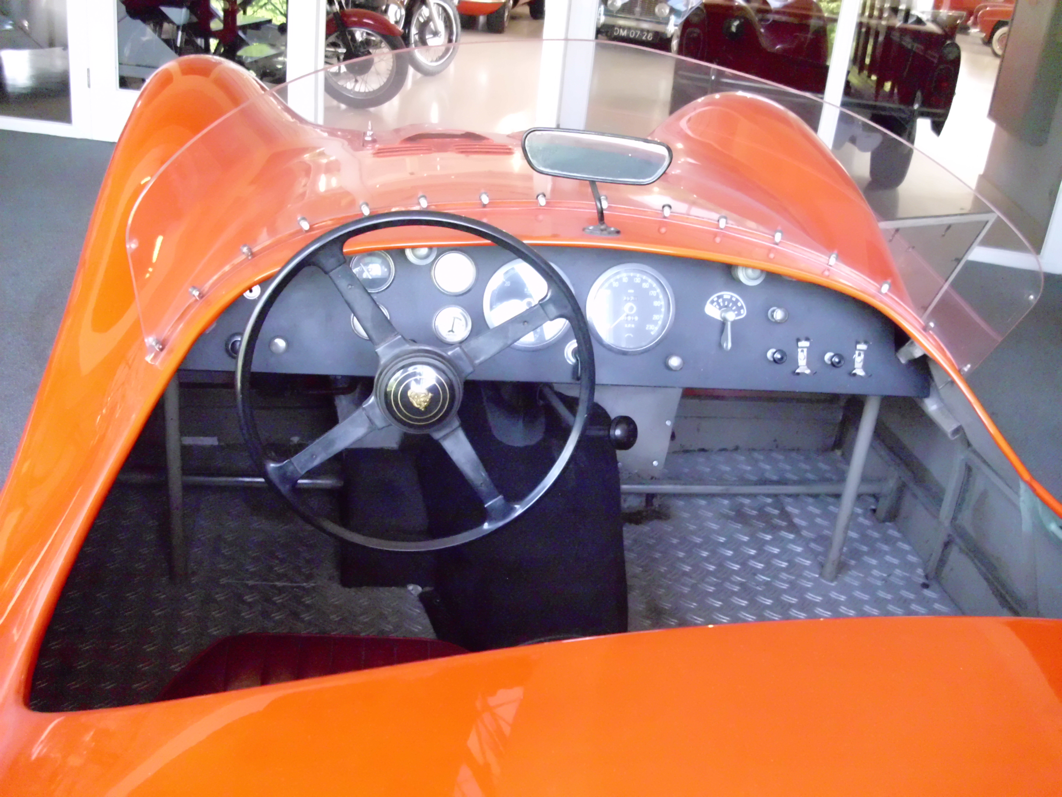 Gatso 1500 Sport Platje Roadster 1948